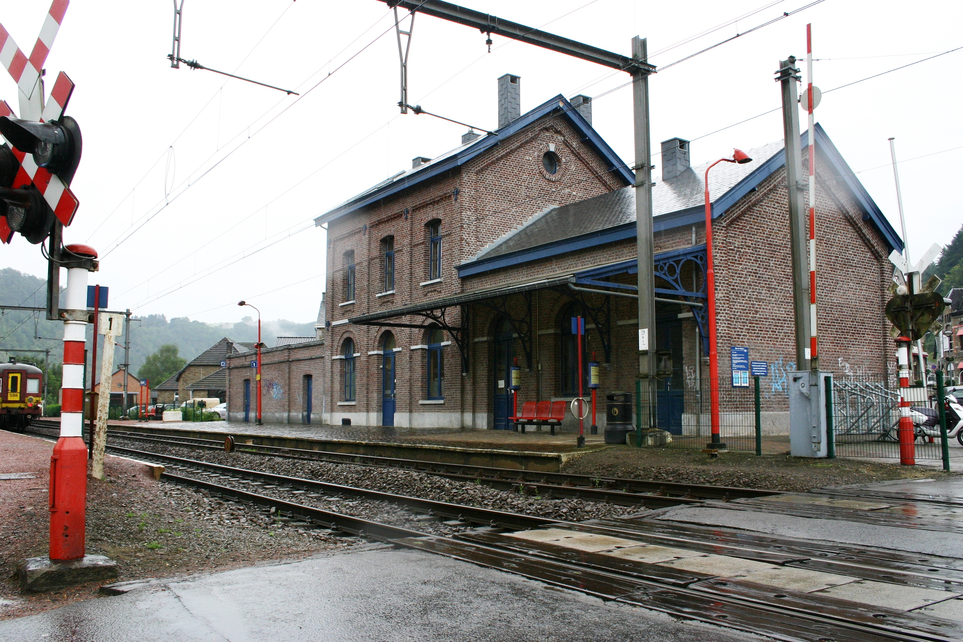 Gare vu Poulseur. Kategorie:Garen an der Belsch